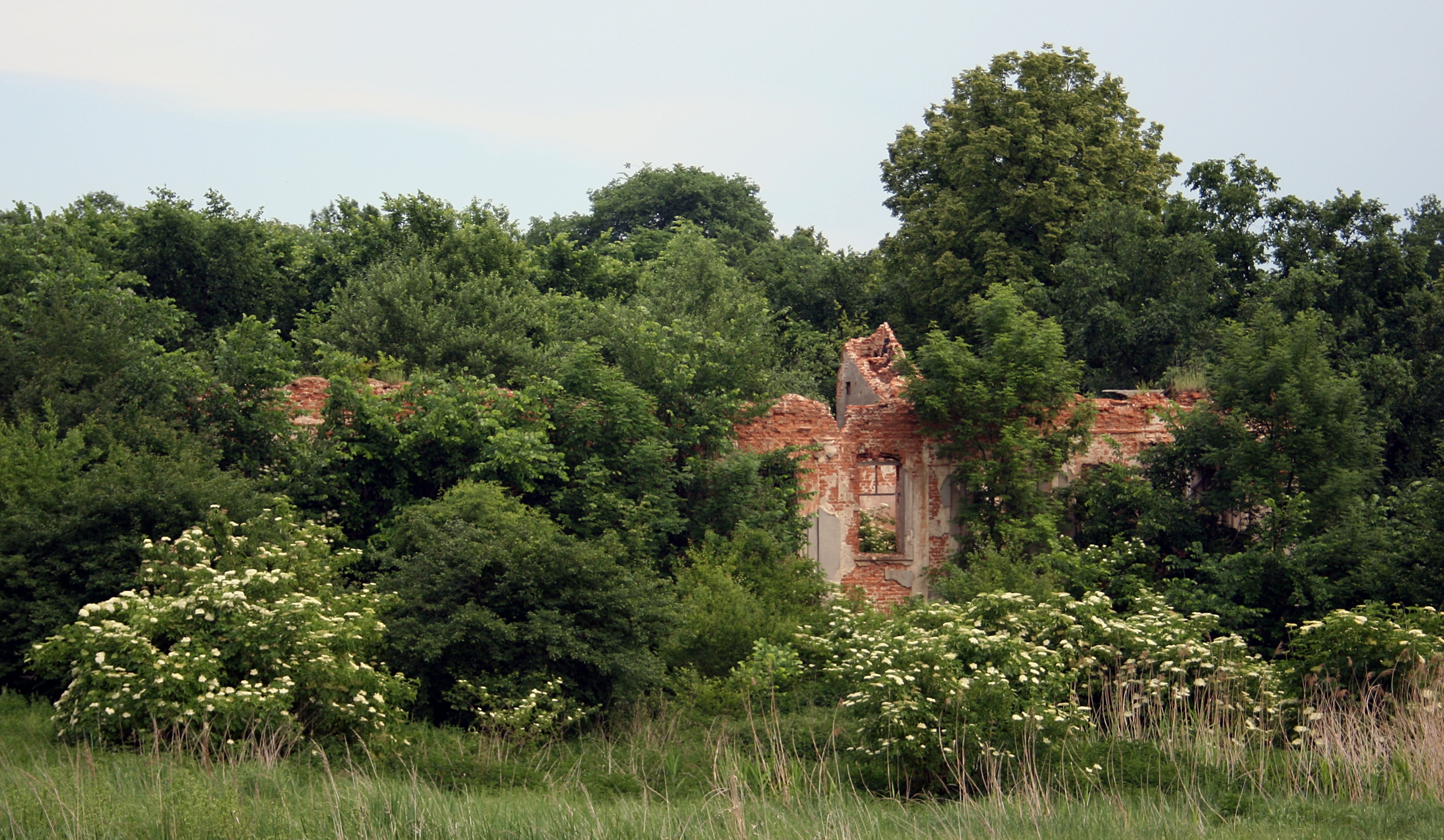 Pniów - ruina barokowego pałacu (zabytek nr A/291/60 z 7.03.1960)